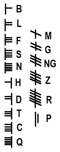 Ogham alphabet [non-IPA]